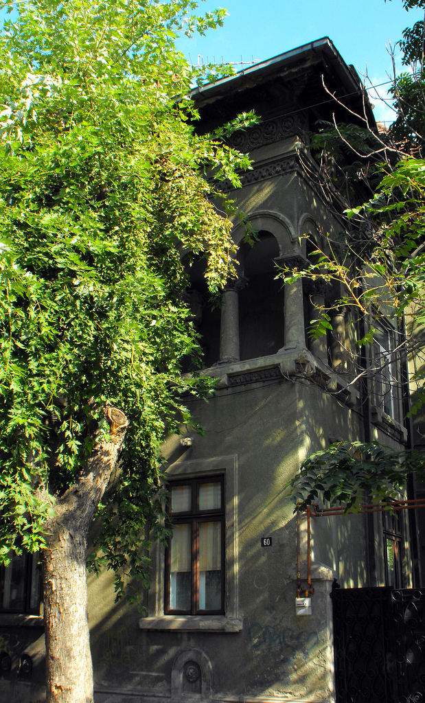 Icoanei 60